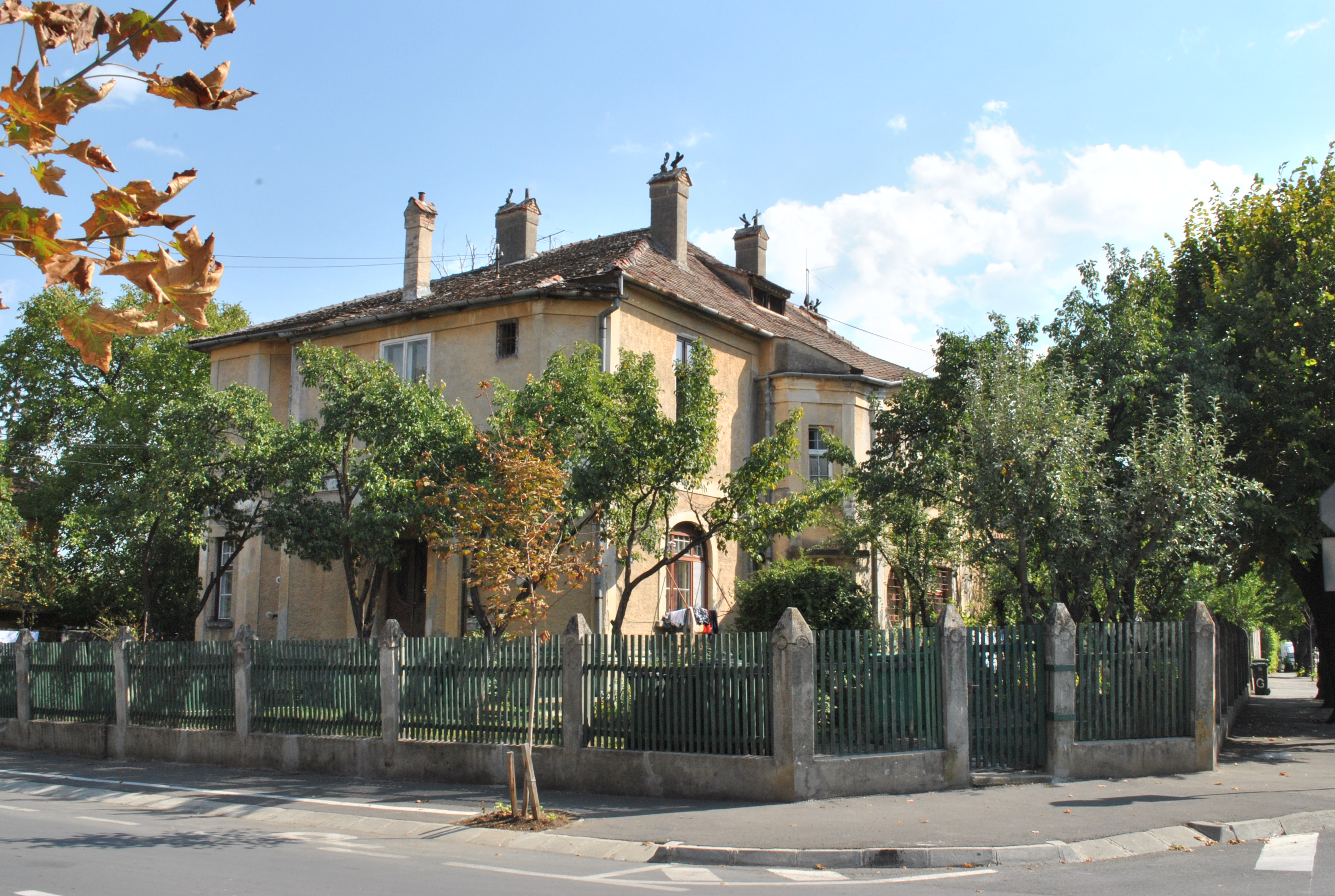 Imobil, 1875-1900